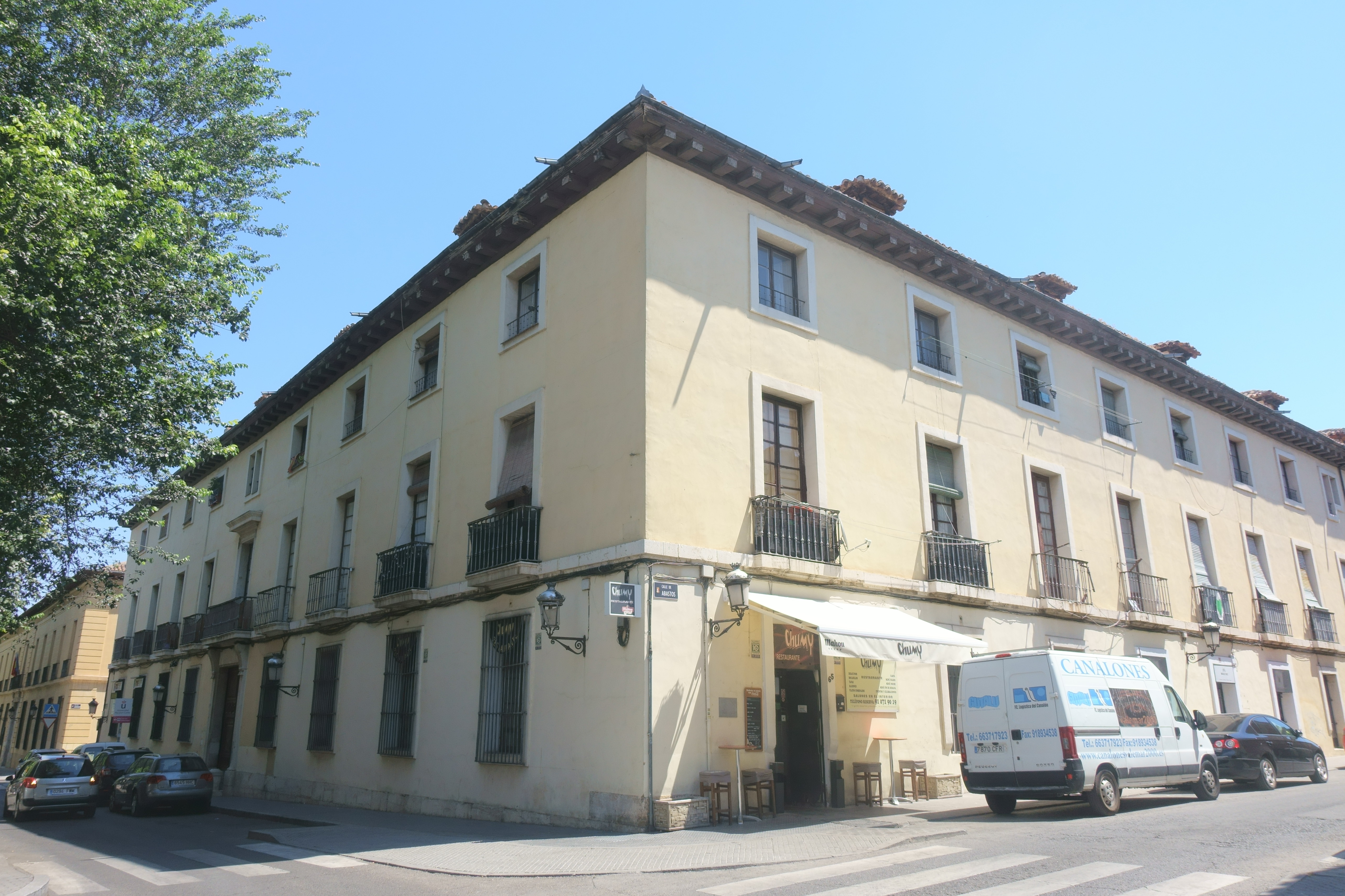 Vista general del palacio del Duque de Medinaceli, en Aranjuez (Madrid, España).